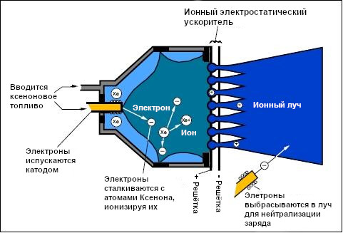 Schematic illustration of the IPS elements (image credit: NASA)